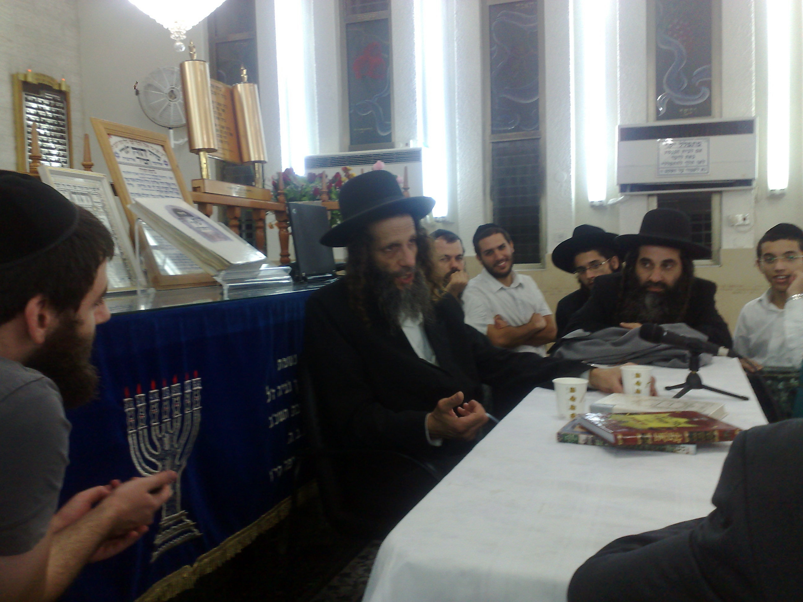 חסידי ברסלב מפלג שובו בנים מאזינים לדבריו של הרב עופר ארז מראשי הרבנים בפלג